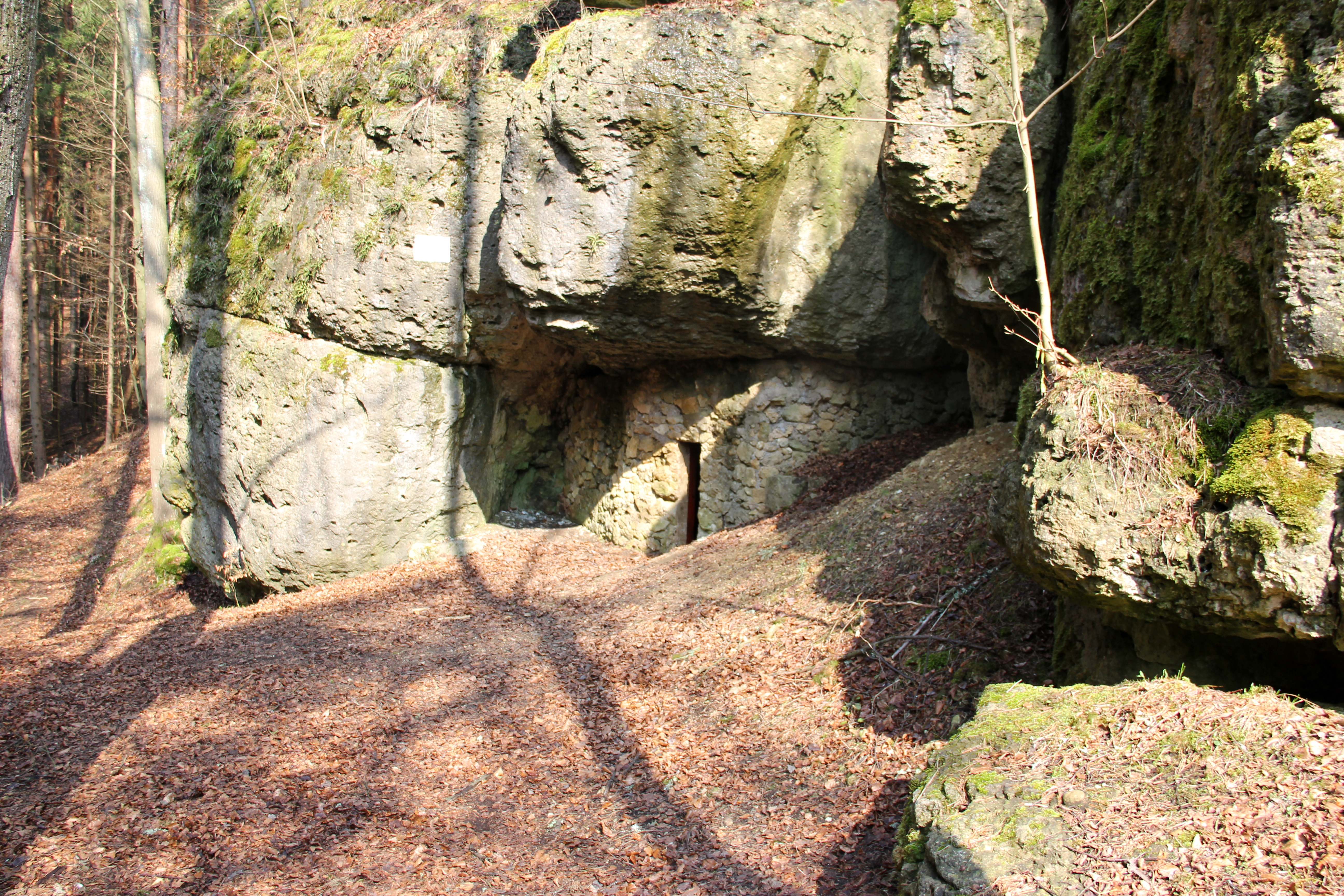 Distlergrotte, Eingang mit Vorplatz